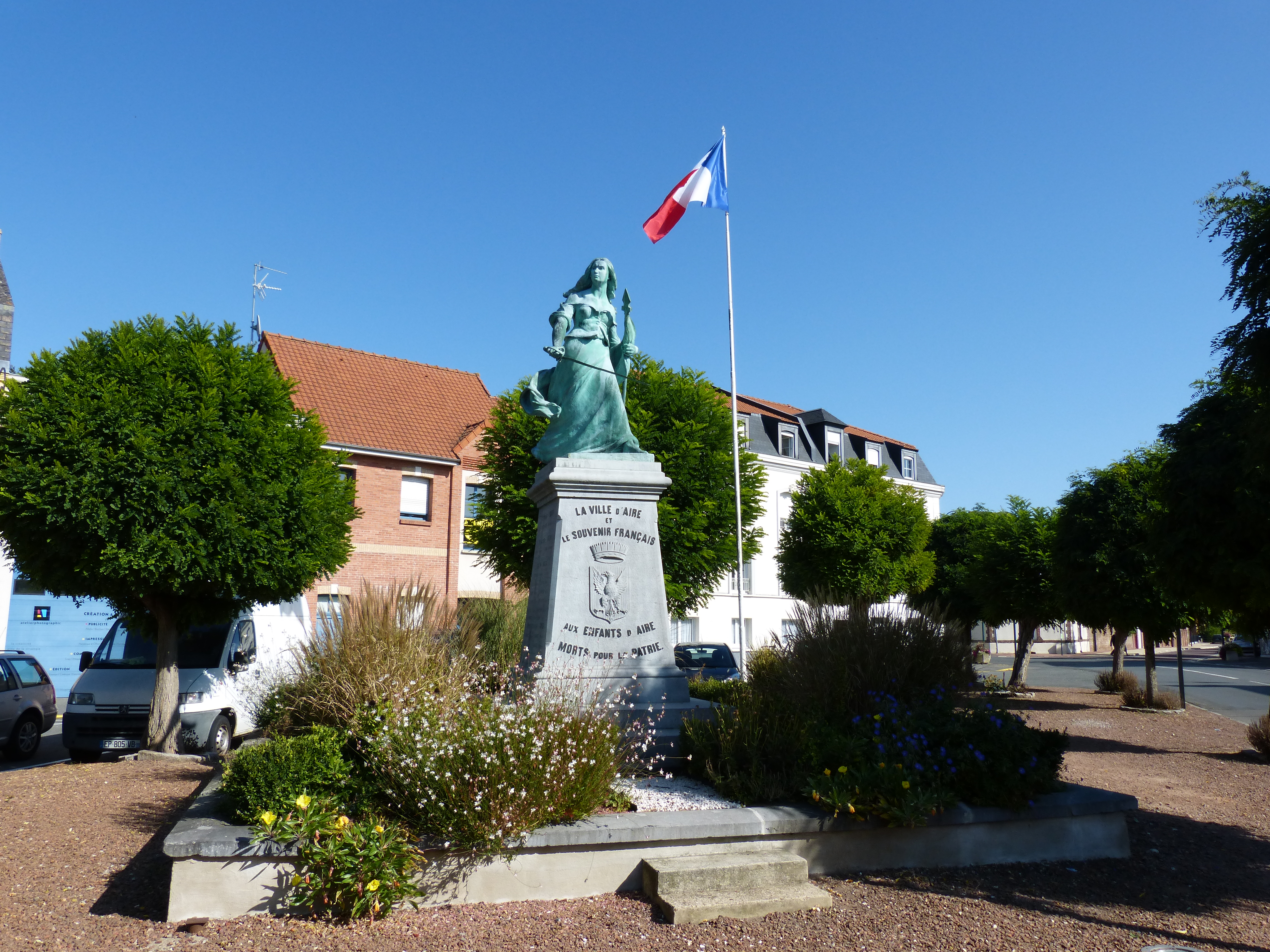 Se situe sur la Place Jehan d'Aire